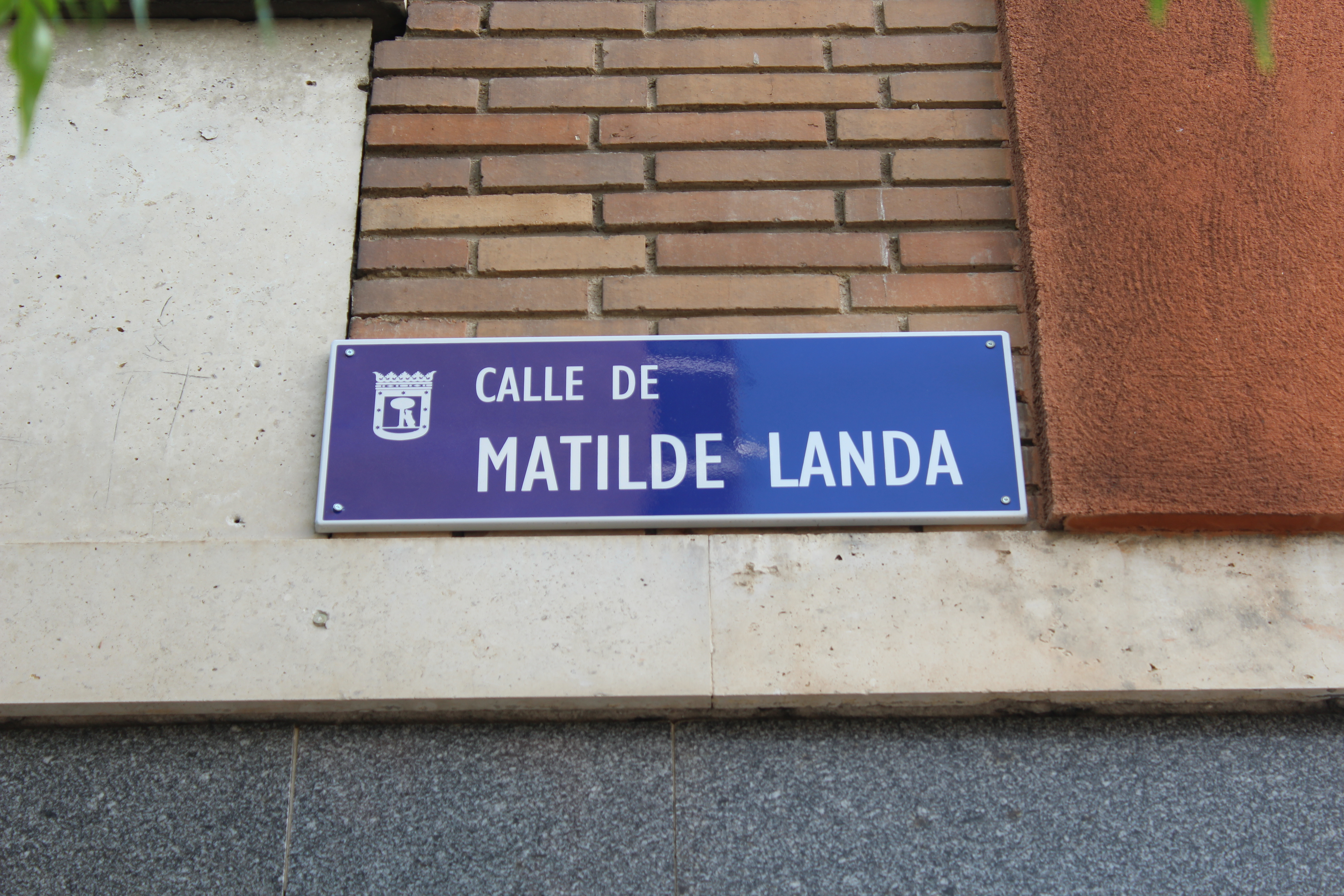 Placa de la calle de Matilde Landa (Madrid).